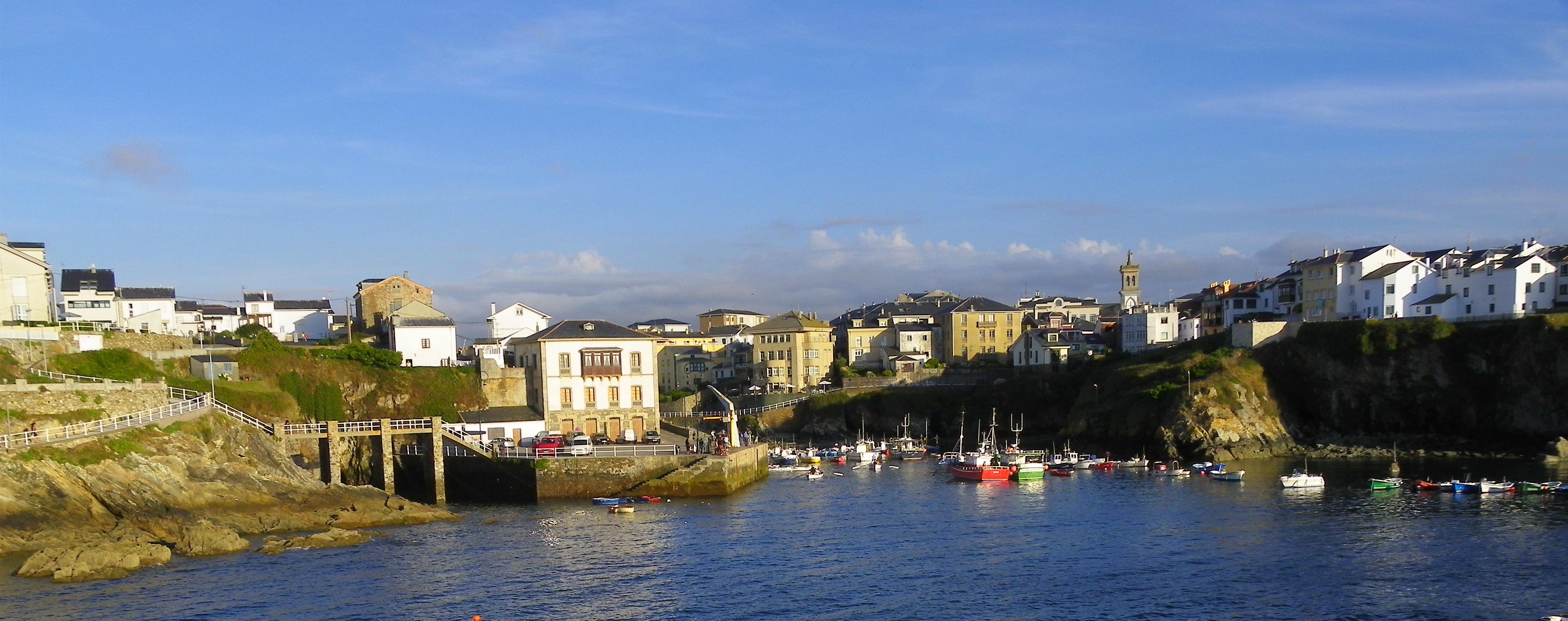 Tapia